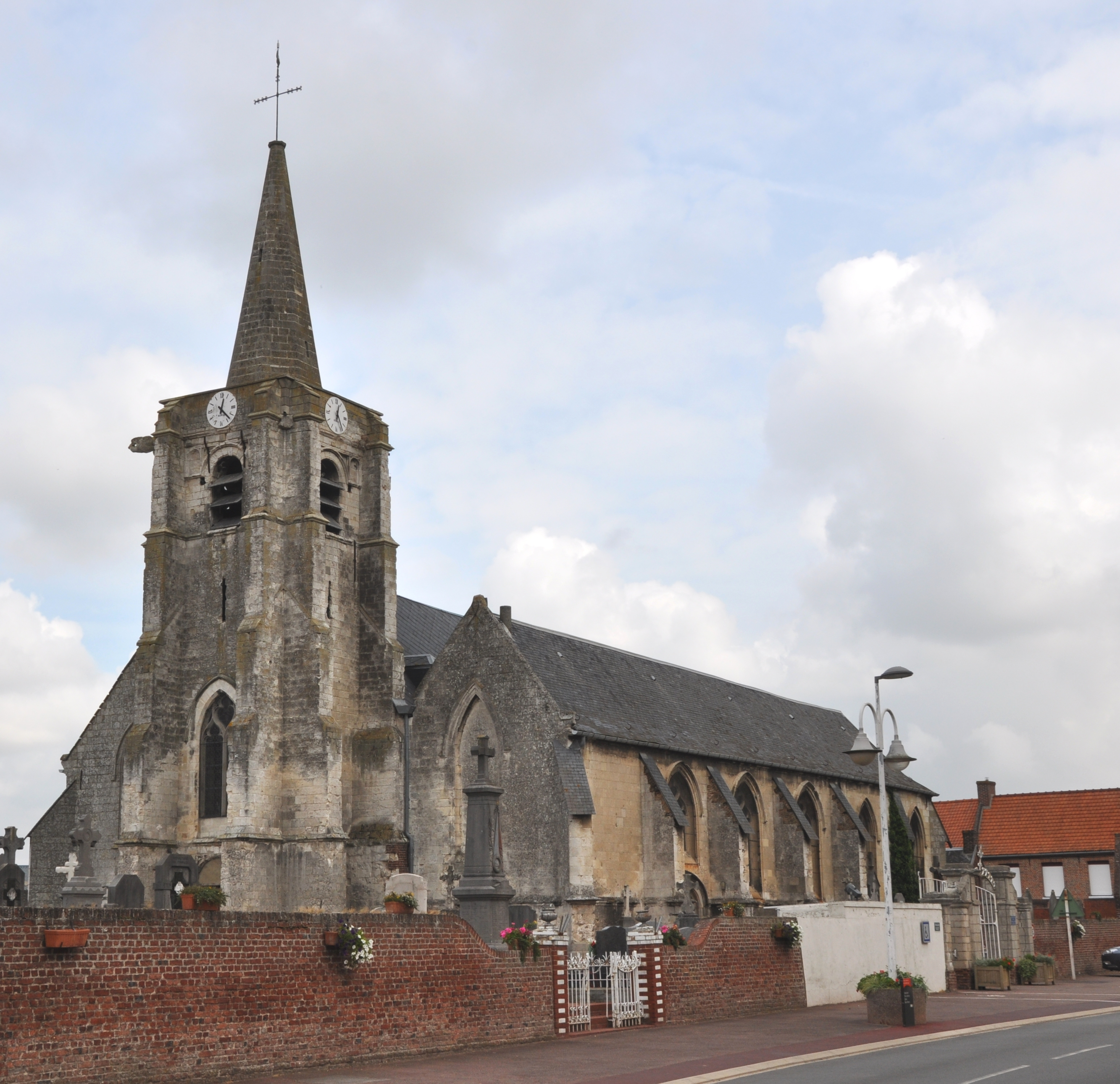 Église Saint-Pierre de Gonnehem, (Inscrit, 1929)